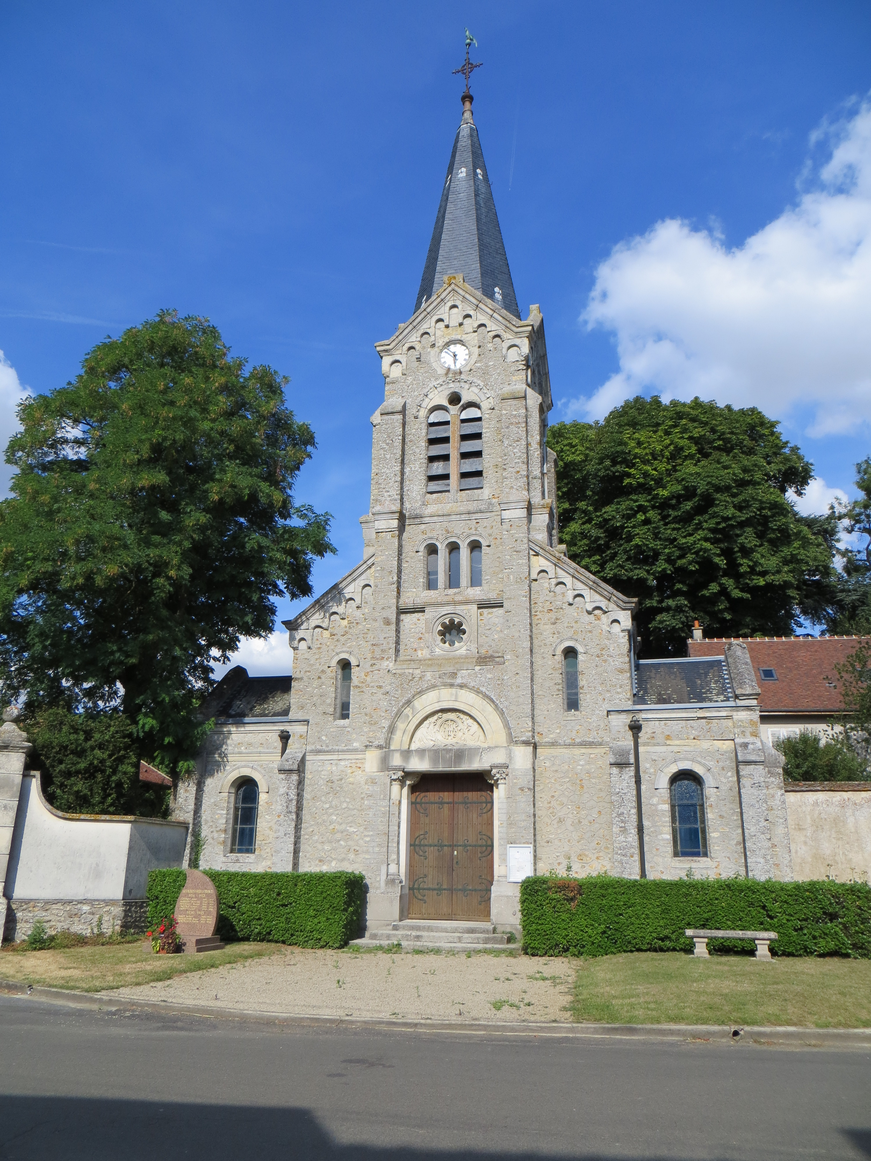 Église de Vaucourtois